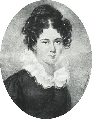 Grillparzers Verlobte Kathi Fröhlich.